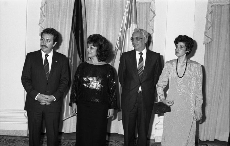 11.-15.10.1986 Besuch des Präsidenten von Guatemala, Lic. Marco Vinicio Cerezo Arévalo, und seiner Frau Lic. Raquel Blandon De Cerezo in der Bundesrepublik Deutschland. Empfang, gegeben von Präsident Cerezo und seiner Frau Lic. Raquel Blandon De Cerezo in der Redute.